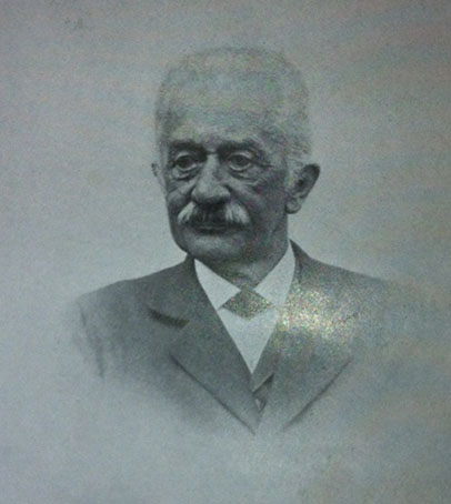 Ferdinand Bischoff (1826 - 1915), Profesor rakouského práva a právních dějin.